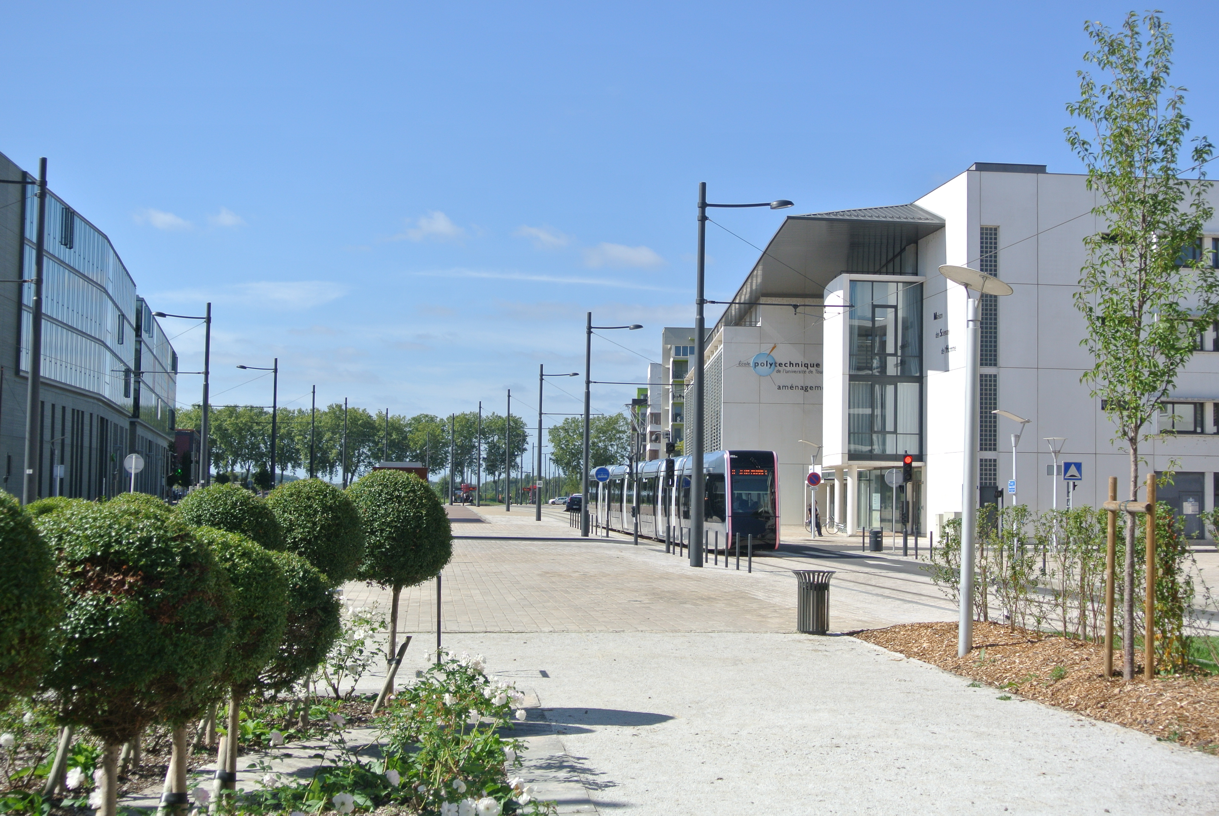 Polytech Tours Département Aménagement et Environnement